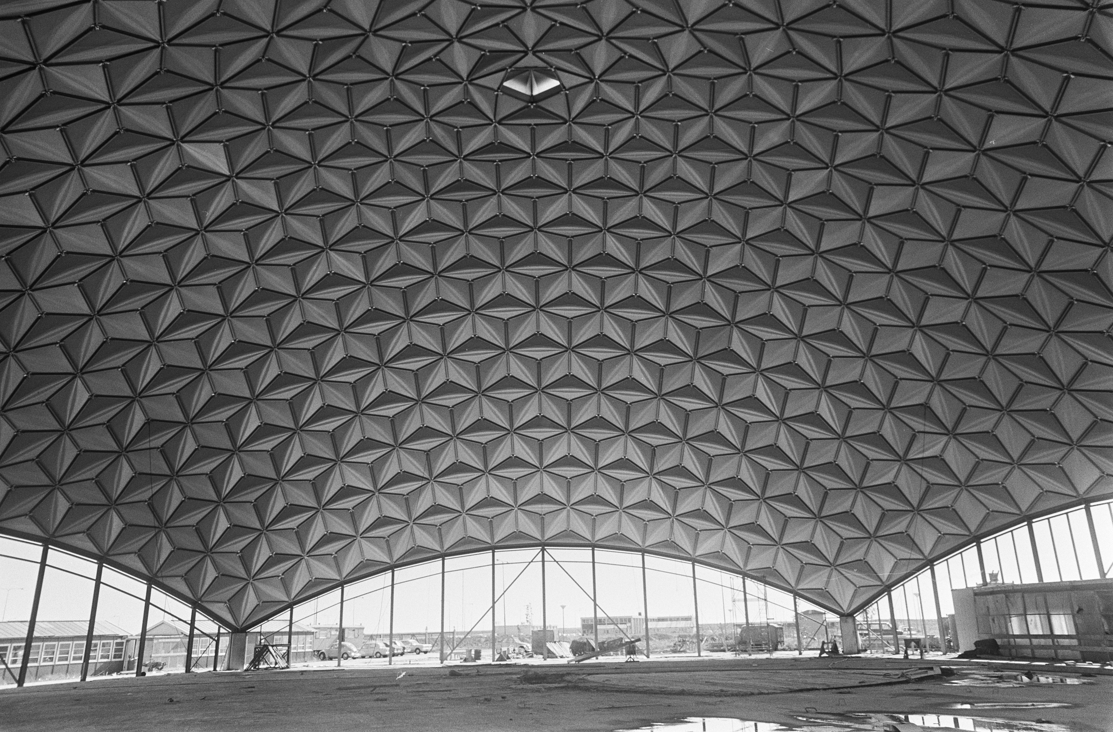 Collectie / Archief : Fotocollectie Anefo Reportage / Serie : Aviodome op Schiphol Beschrijving : Aviodome op Schiphol in opbouw, de binnenzijde van het dak Datum : 26 juni 1969 Locatie : Haarlemmermeer, Noord-Holland Trefwoorden : bouwmaterialen, museums Fotograaf : Fotograaf Onbekend / Anefo Auteursrechthebbende : Nationaal Archief Materiaalsoort : Negatief (zwart/wit) Nummer archiefinventaris : bekijk toegang 2.24.01.05 Bestanddeelnummer : 922-5752